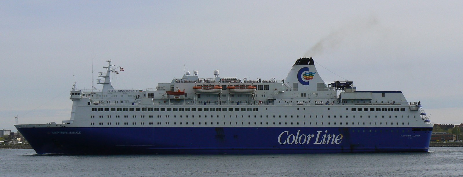 Fähre Kronprins Harald in der Kieler Förde.